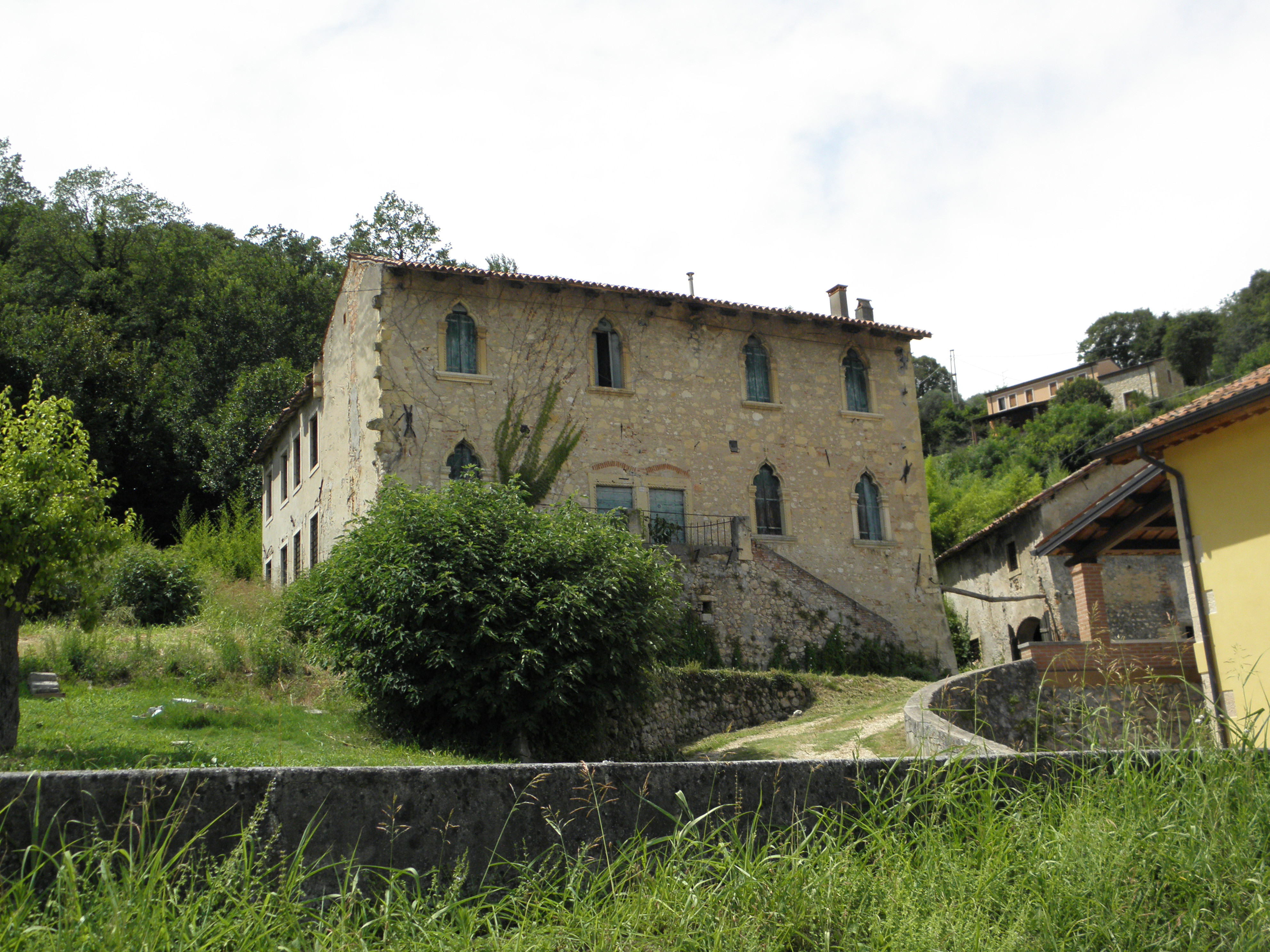 Villa del Ferro, frazione di Val Liona e già frazione di San Germano dei Berici: Villa Giacometti (XV secolo).